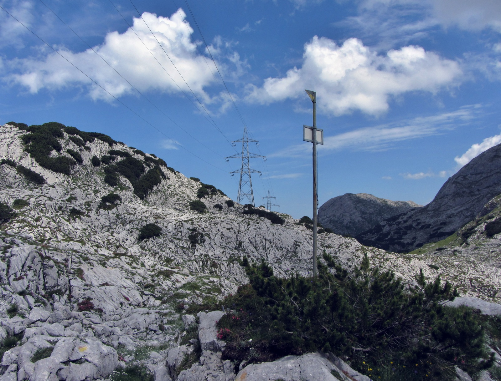 220-kV-Überlandleitung Tauern–Salzburg (APG) durch das Hagengebirge in Österreich. Der Verbundsteig folgt dieser Leitung.